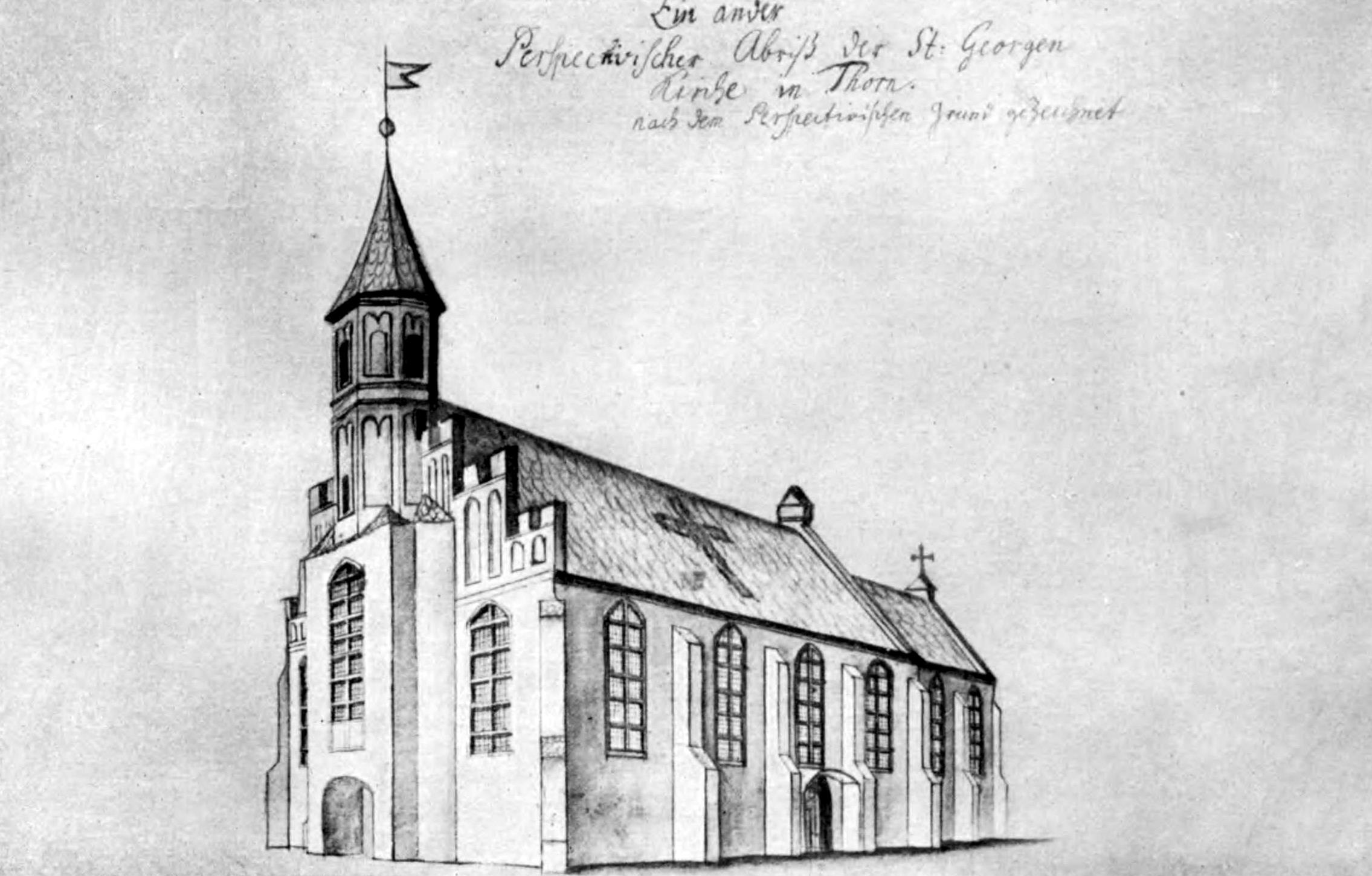 Nieistniejący już kościół św. Jerzego w Toruniu widziany od południowego zachodu